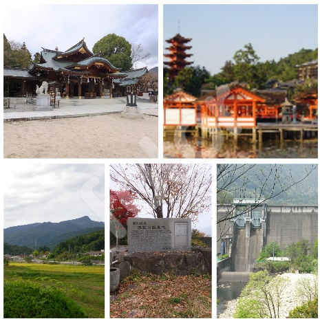 廿日市市の以下５画像をコラージュ化したもの。 File:Hayatani_Shrine_20121124-02.JPG File:20100723_Miyajima_Itsukushima_5140.jpg File:Miyahama_Onsen_20121124-1.JPG File:Mt.Kanmuriyama.jpg File:Ozegawa-2071-r1.JPG